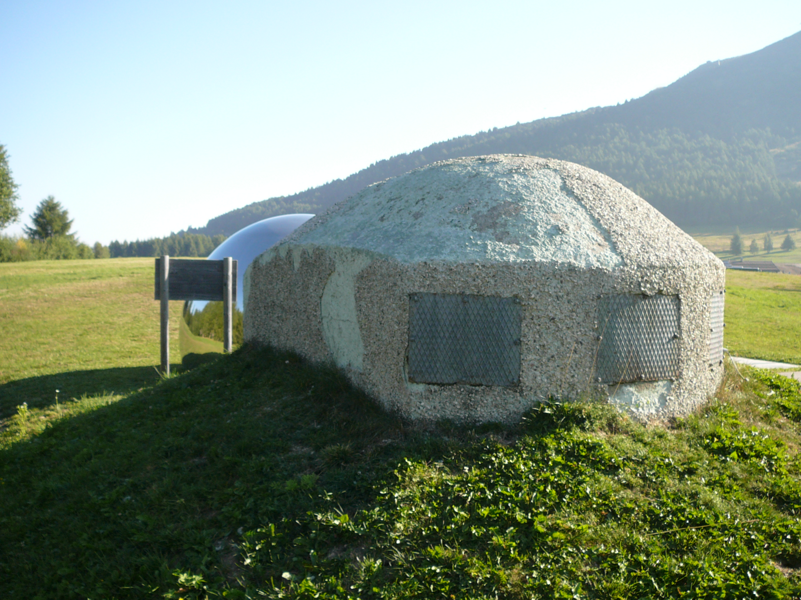 Monte Bondone - Ex poligono